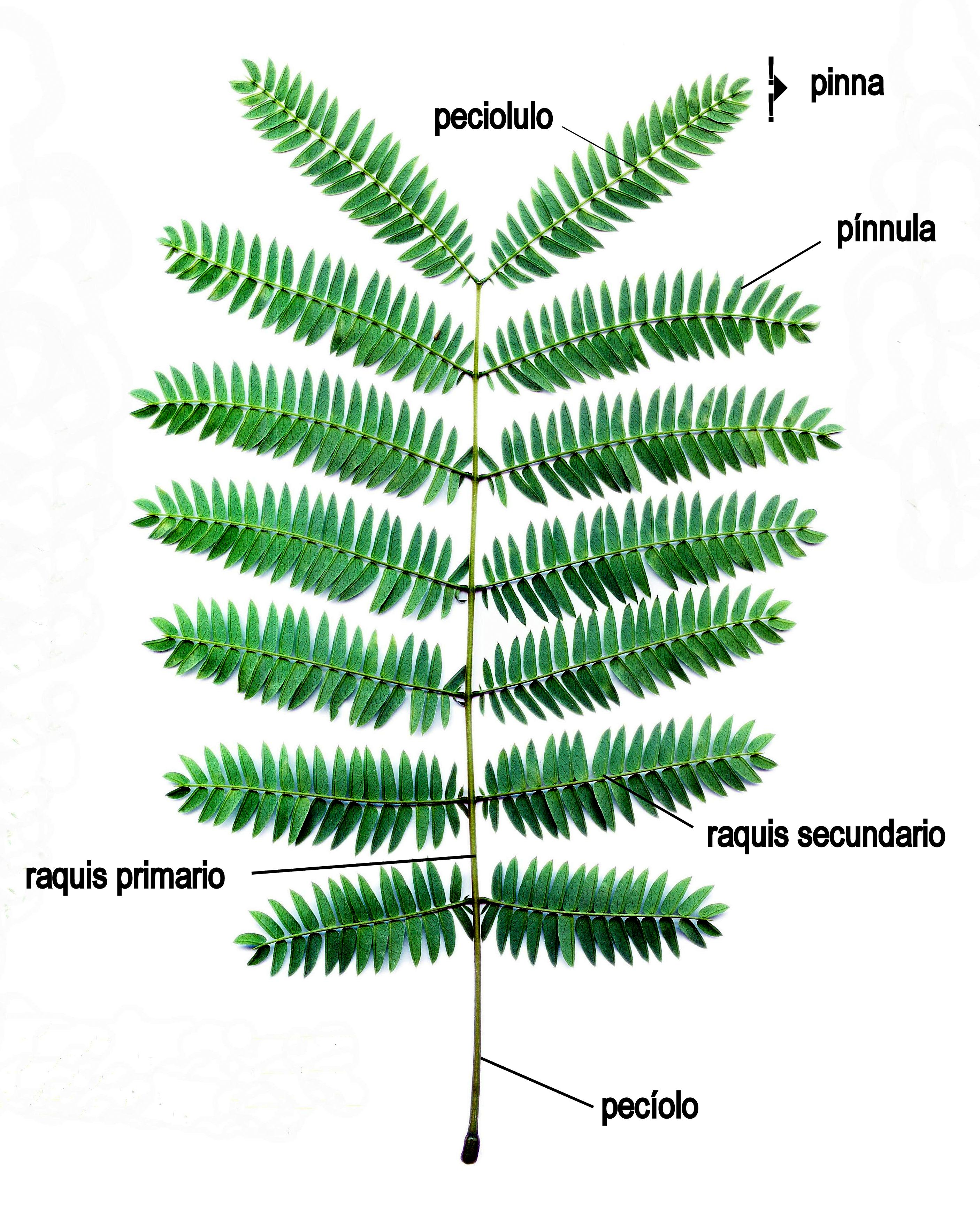 Morfología de una hoja biparipinnada (Albizia): peciolo, peciolulo, raquis, pinna y pinnula.